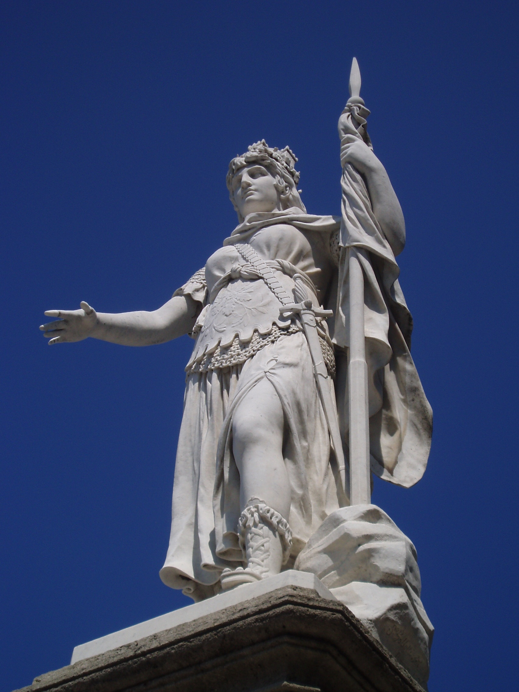 La Statua della Libertà, collocata nel Pianello (o Piazza della Libertà) antistante il Palazzo pubblico di San Marino, scolpita da Stefano Galletti (1833-1905) e donata da Otilia Heyroth Wagener nel 1876.